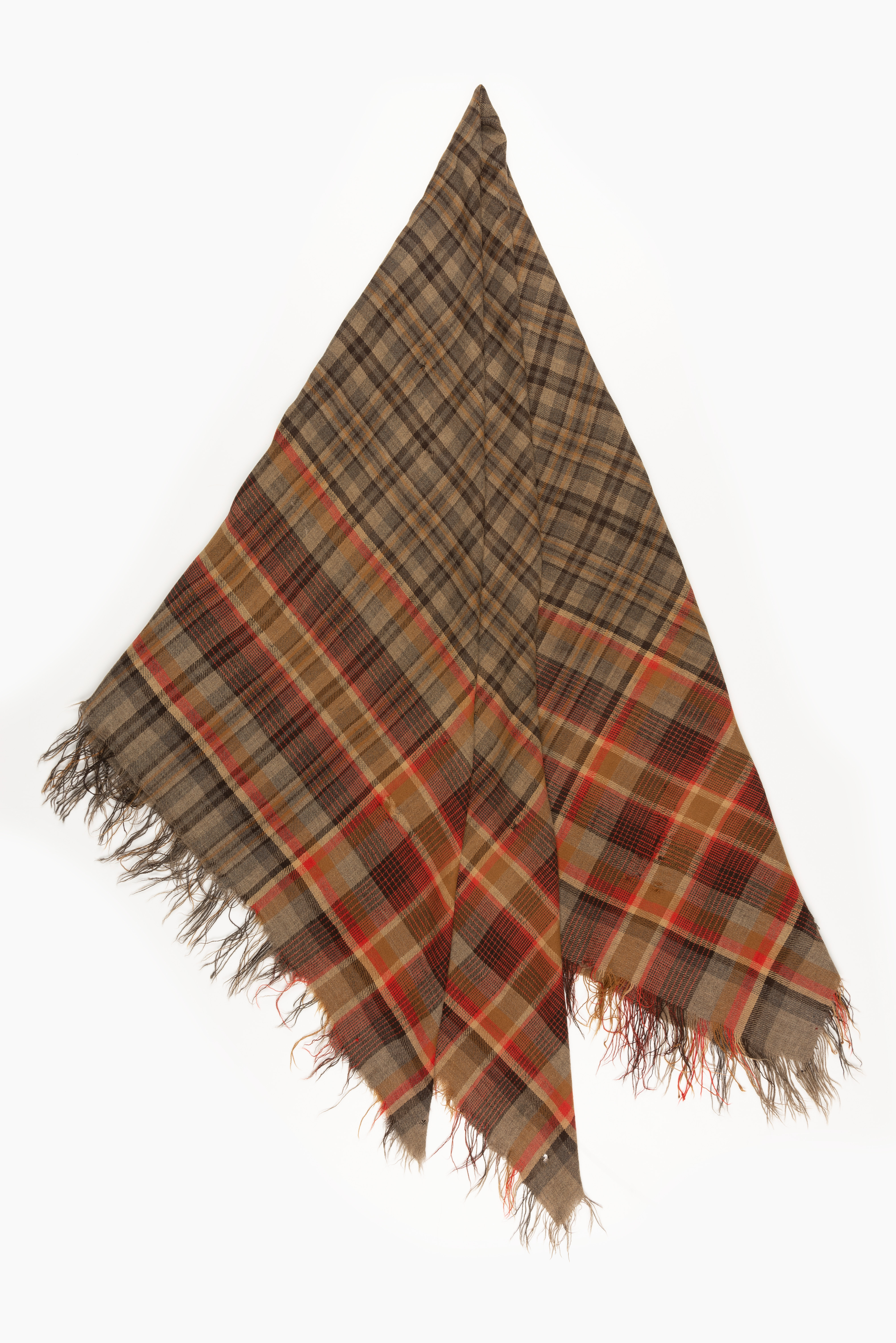 Suurrätt